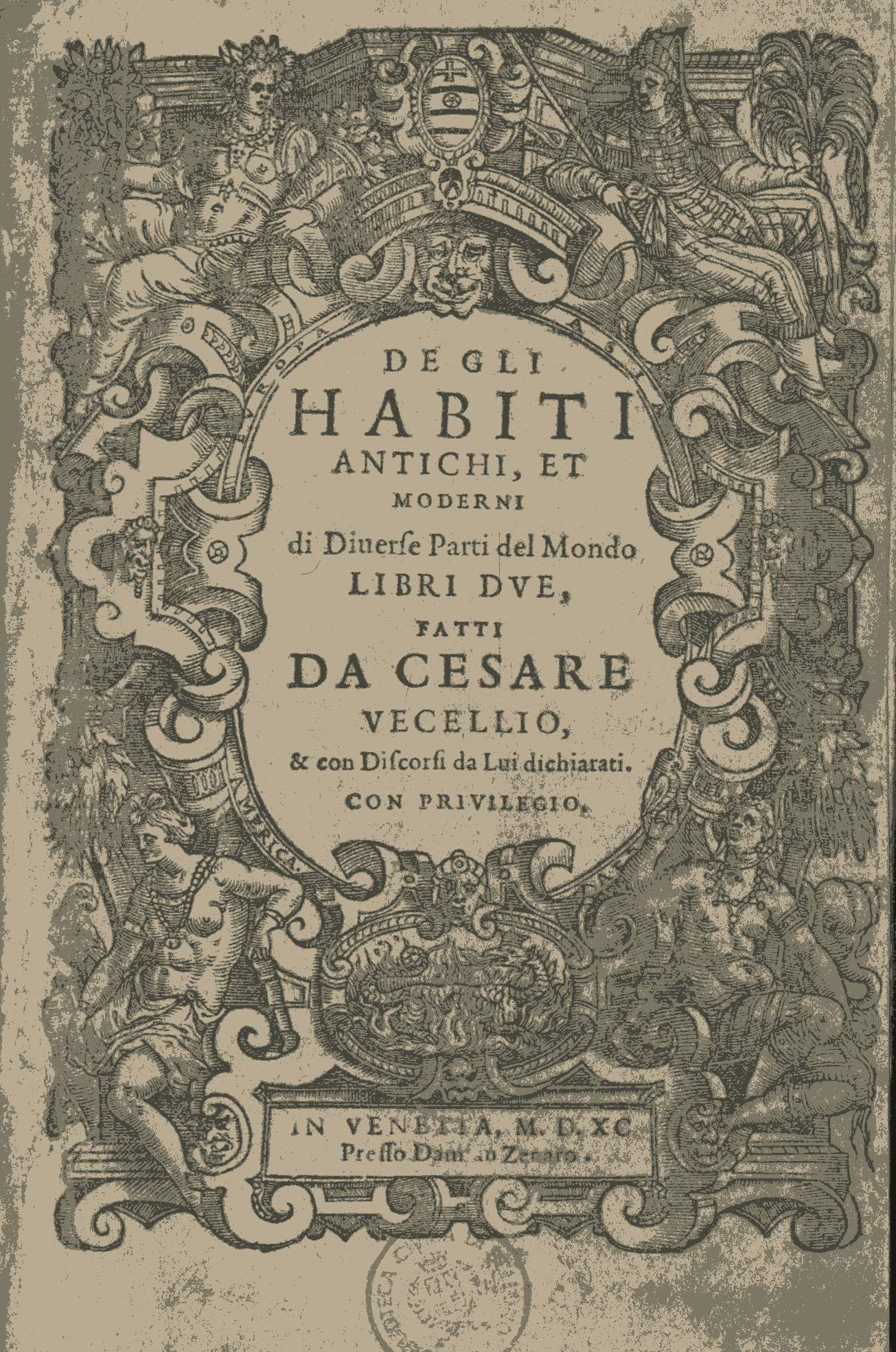 Frontespizio della prima edizione di Cesare Vecellio, De gli habiti antichi et moderni, Venezia 1590